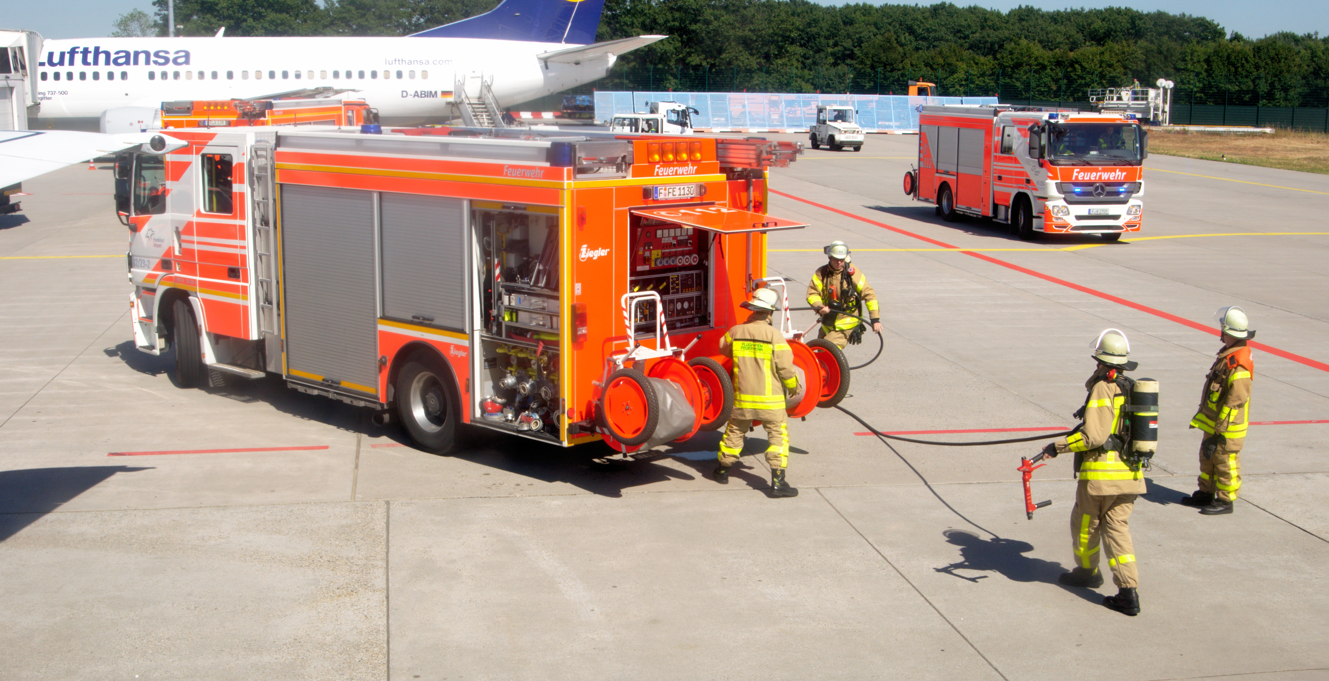 Einsatz der Flughafenfeuerwehr aufgrund von Rauch im Cockpit von LH 972. Aufnahme aus der Kabine von LH 972.